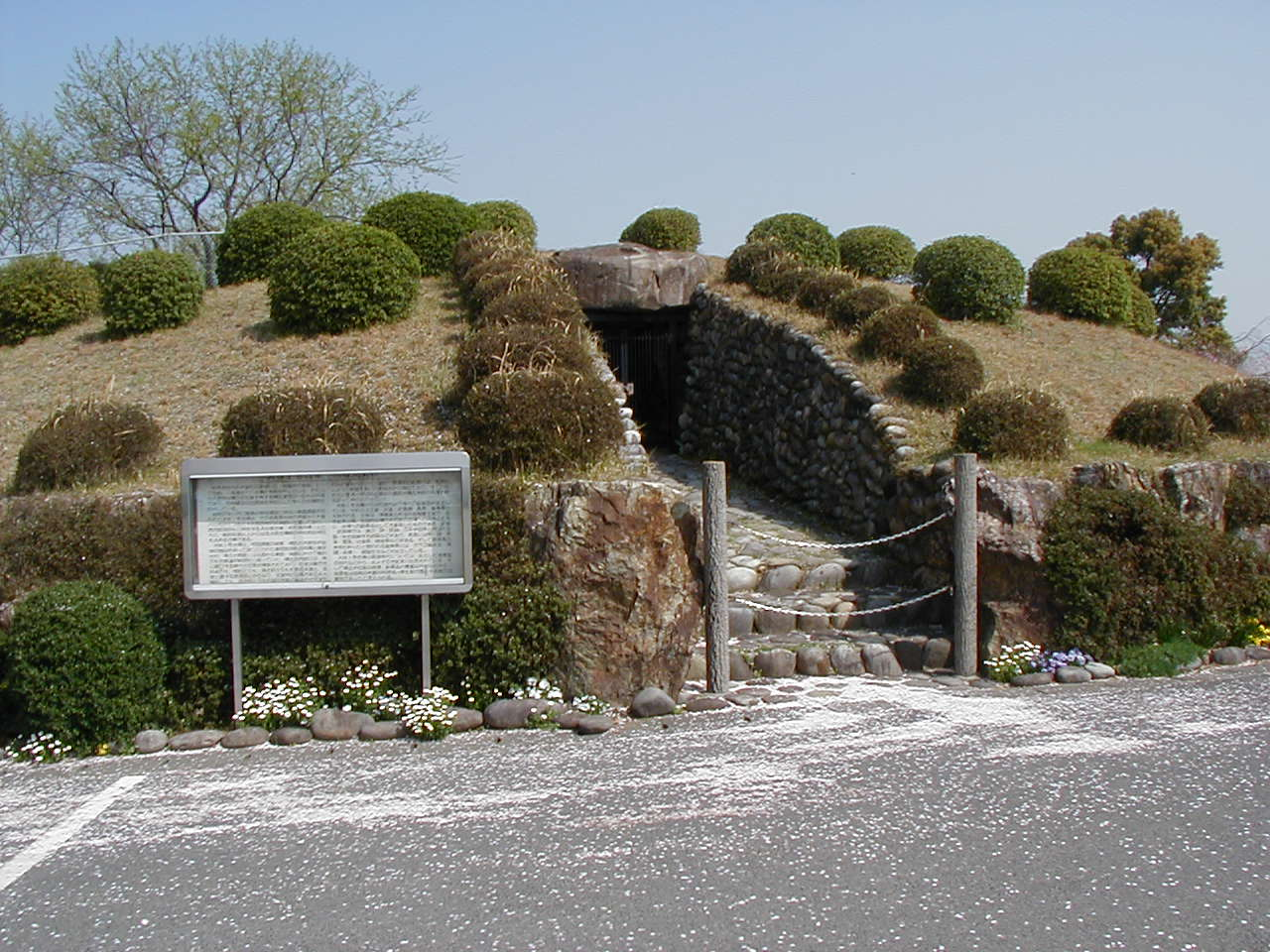 oumakiichigoukohun-1（大牧1号古墳）